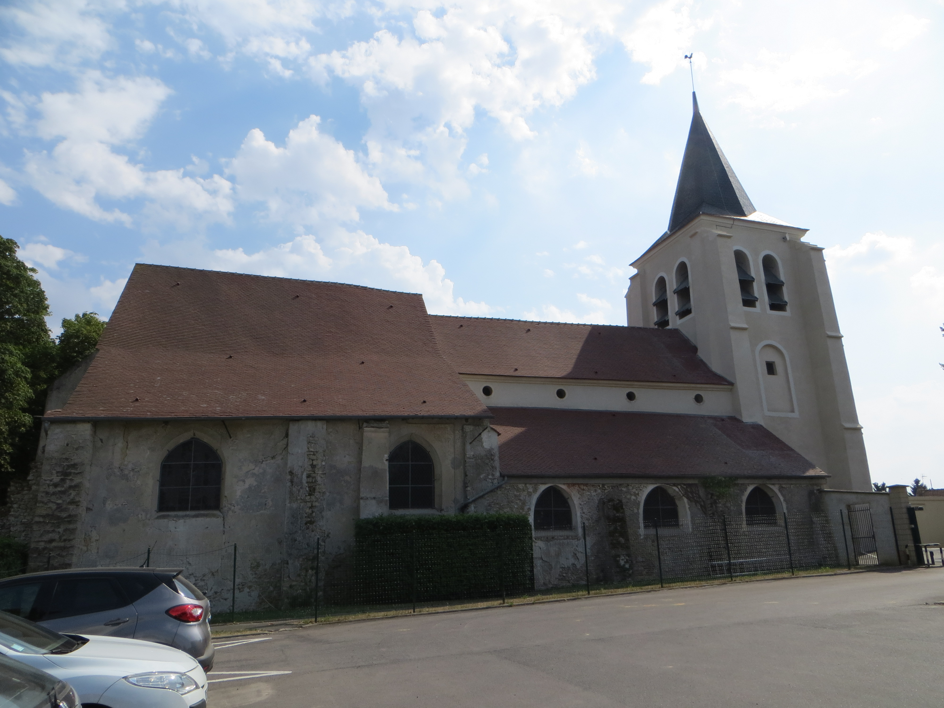 Vue de l'église